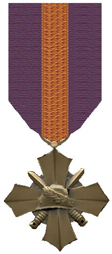 Mobilisatie-Oorlogskruis 1948 Nederland